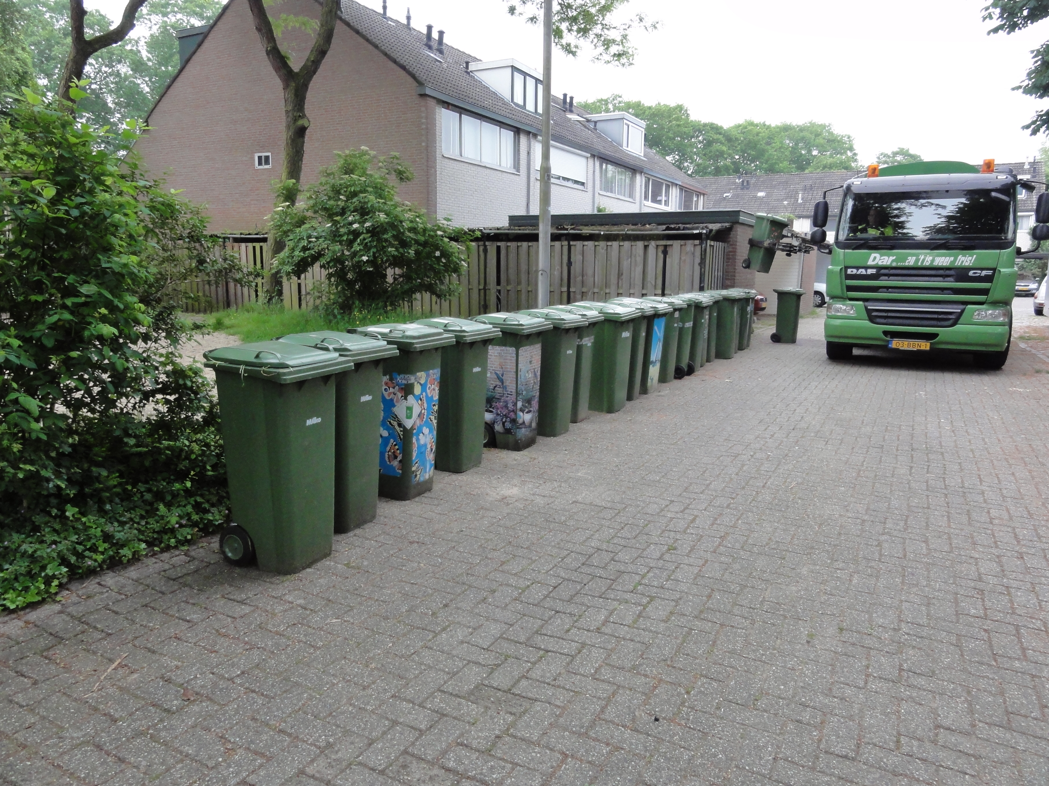 containers emptying in truck, Nijmegen Dukenburg 2016